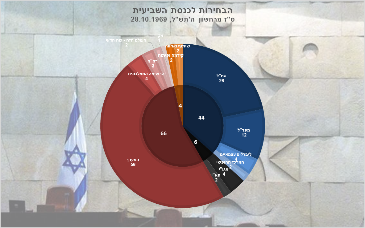 תוצאות הבחירות לכנסת השביעית